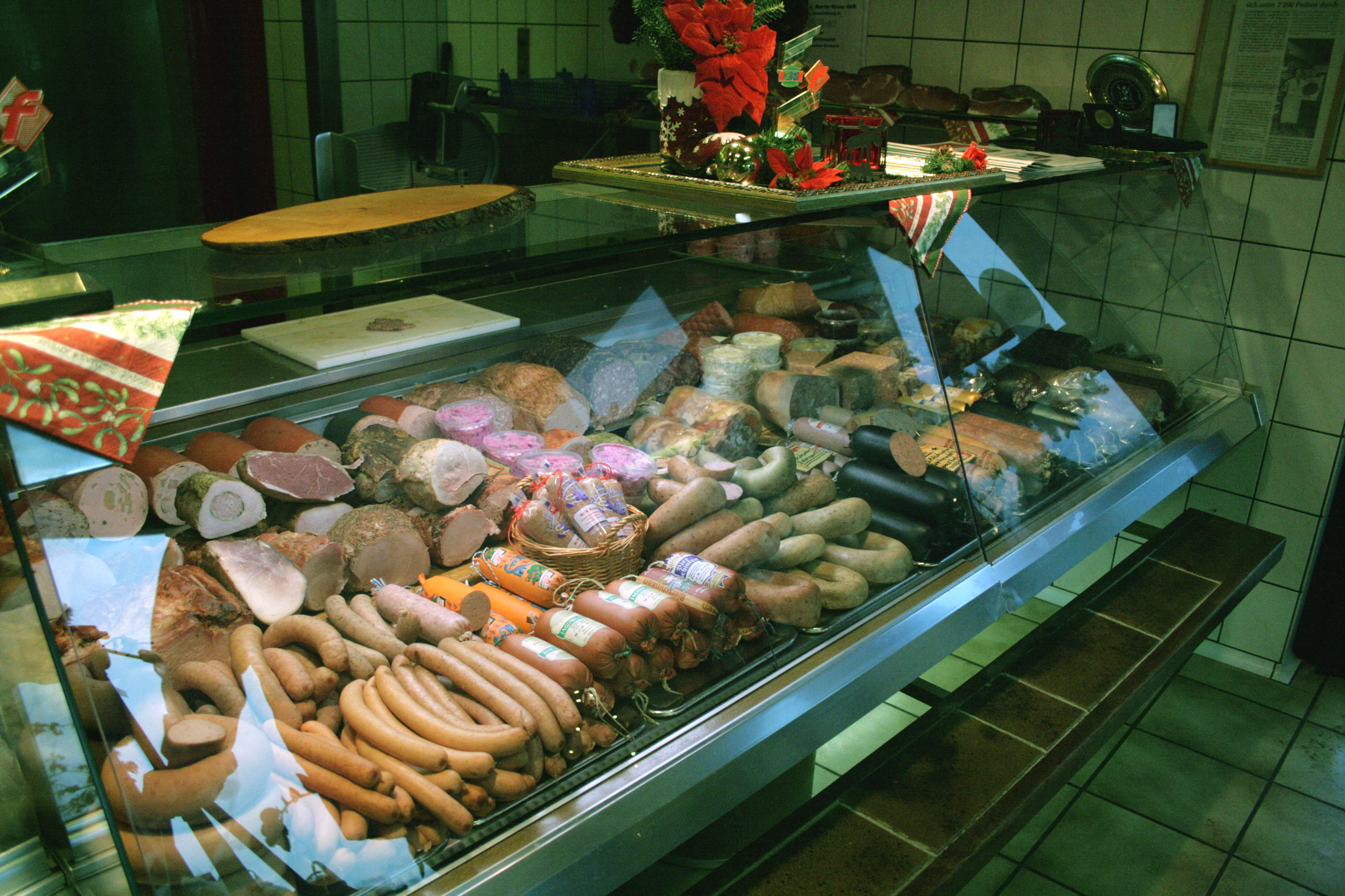 Aufschnitt und Wurst in der Auslage einer Metzgerei (Metzgerei Klaus, Versmold, Germany)